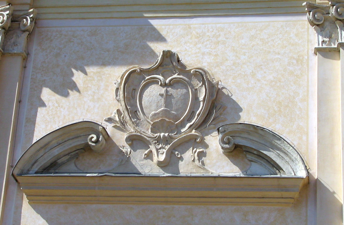 Asti, Ex Chiesa di San Giuseppe, particolare dello stemma sopra il portale . Foto fatta da me faberh 2006